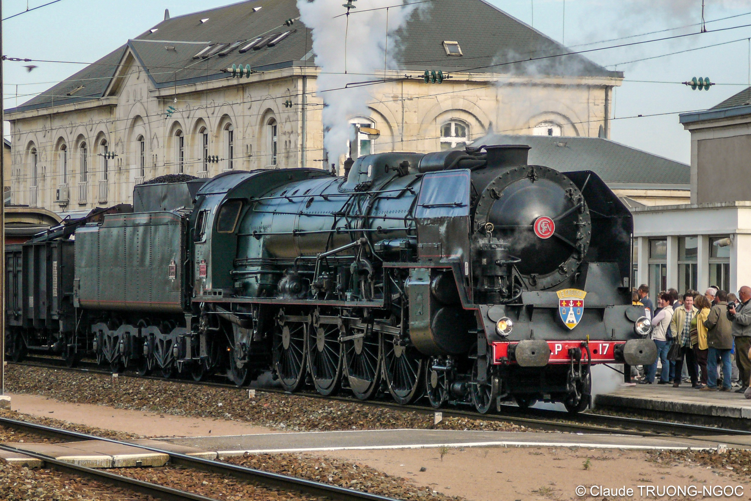 Locomotive à vapeur 241P17 à Dole